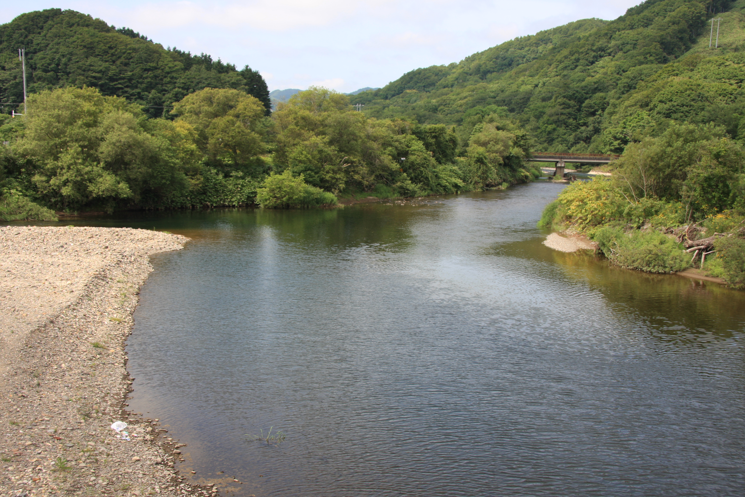 遊楽部川 清流建石橋より上流を望む